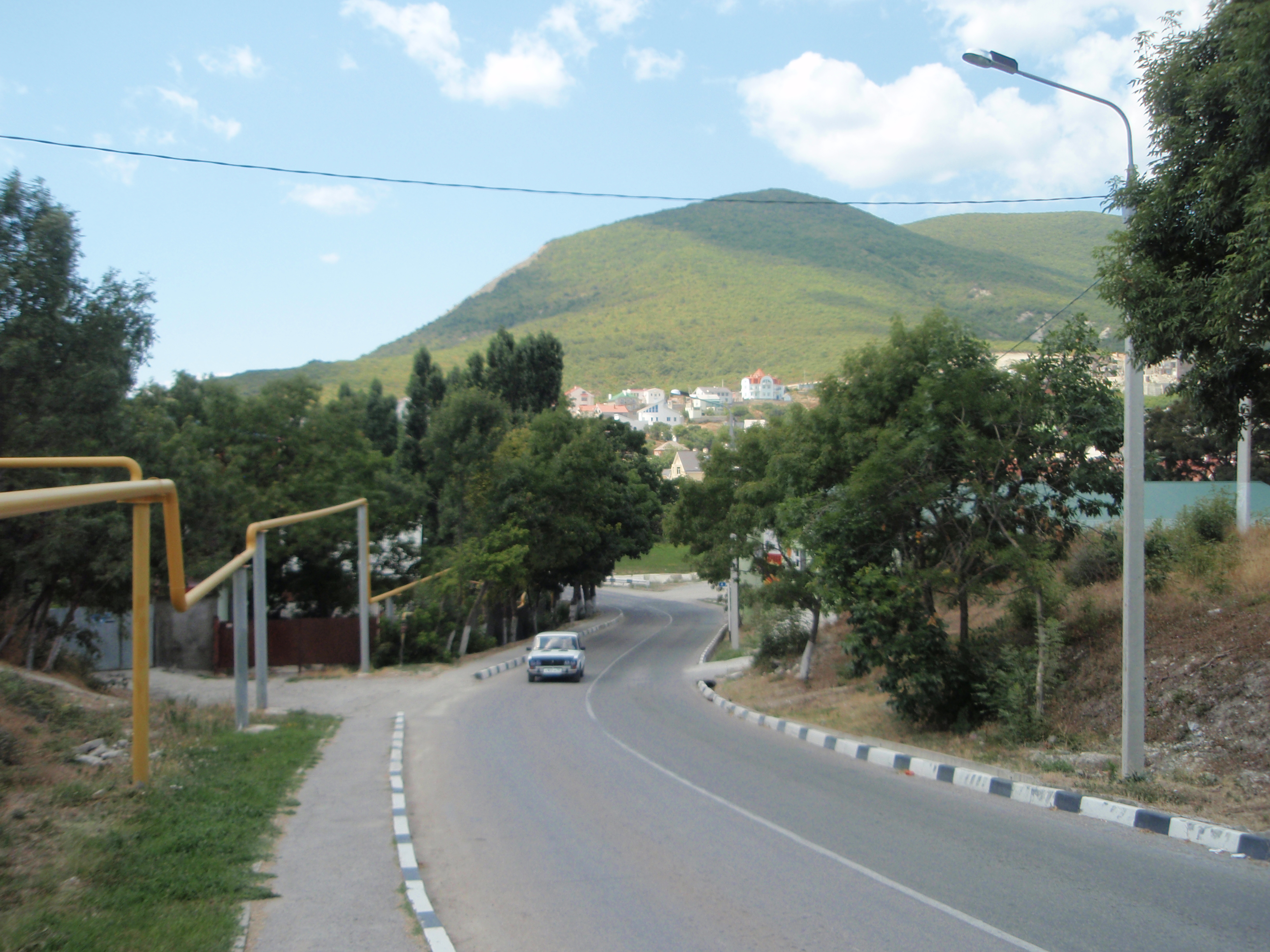 Вид на склон горы Колдун (п.Мысхако)